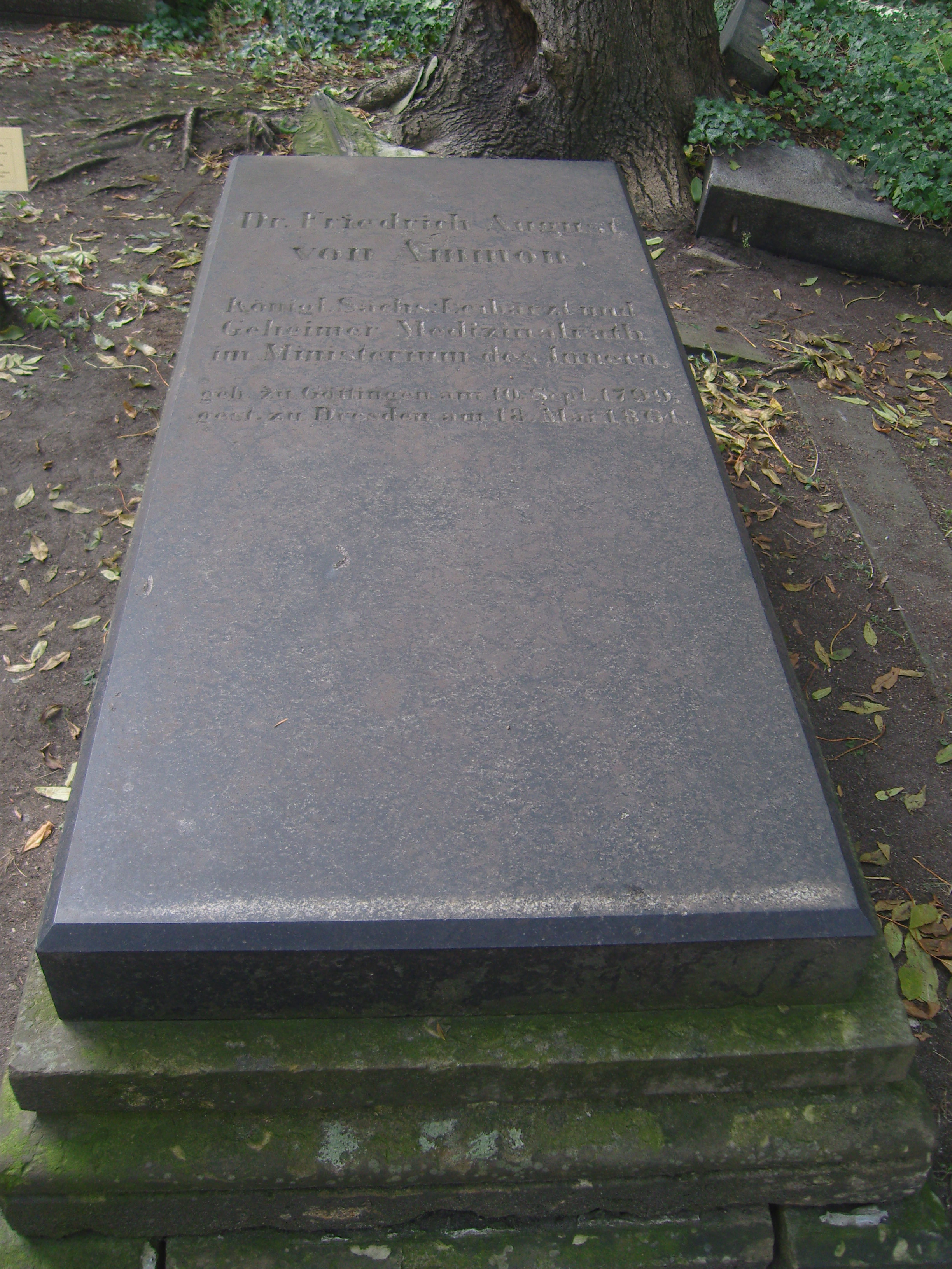 Grab von Christoph Friedrich von Ammon auf dem Eliasfriedhof in Dresden